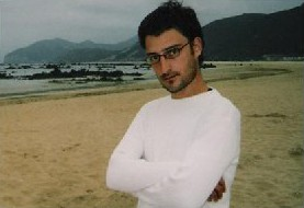 El escritor Miguel Angel Villar Pinto